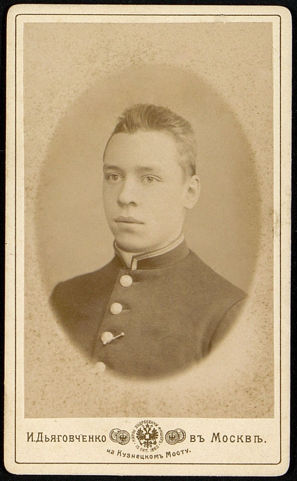 Николай Сергеевич Каринский (1873-1948), выпускник гимназии